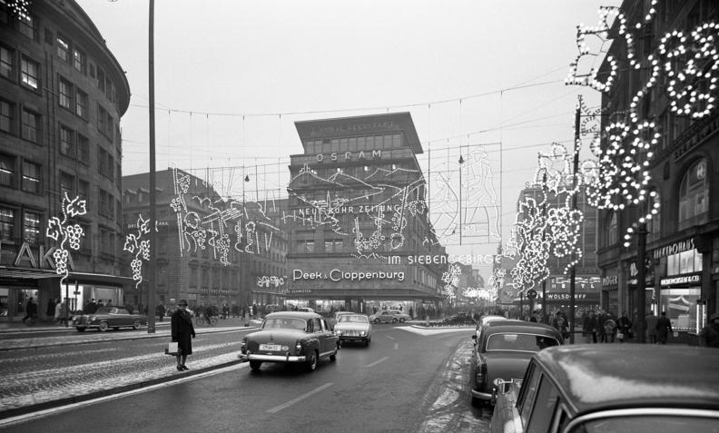 28.12.1961 Essen Lichtwochen 1961 "Eine Rheinreise in Licht von Rotterdam bis Basel"